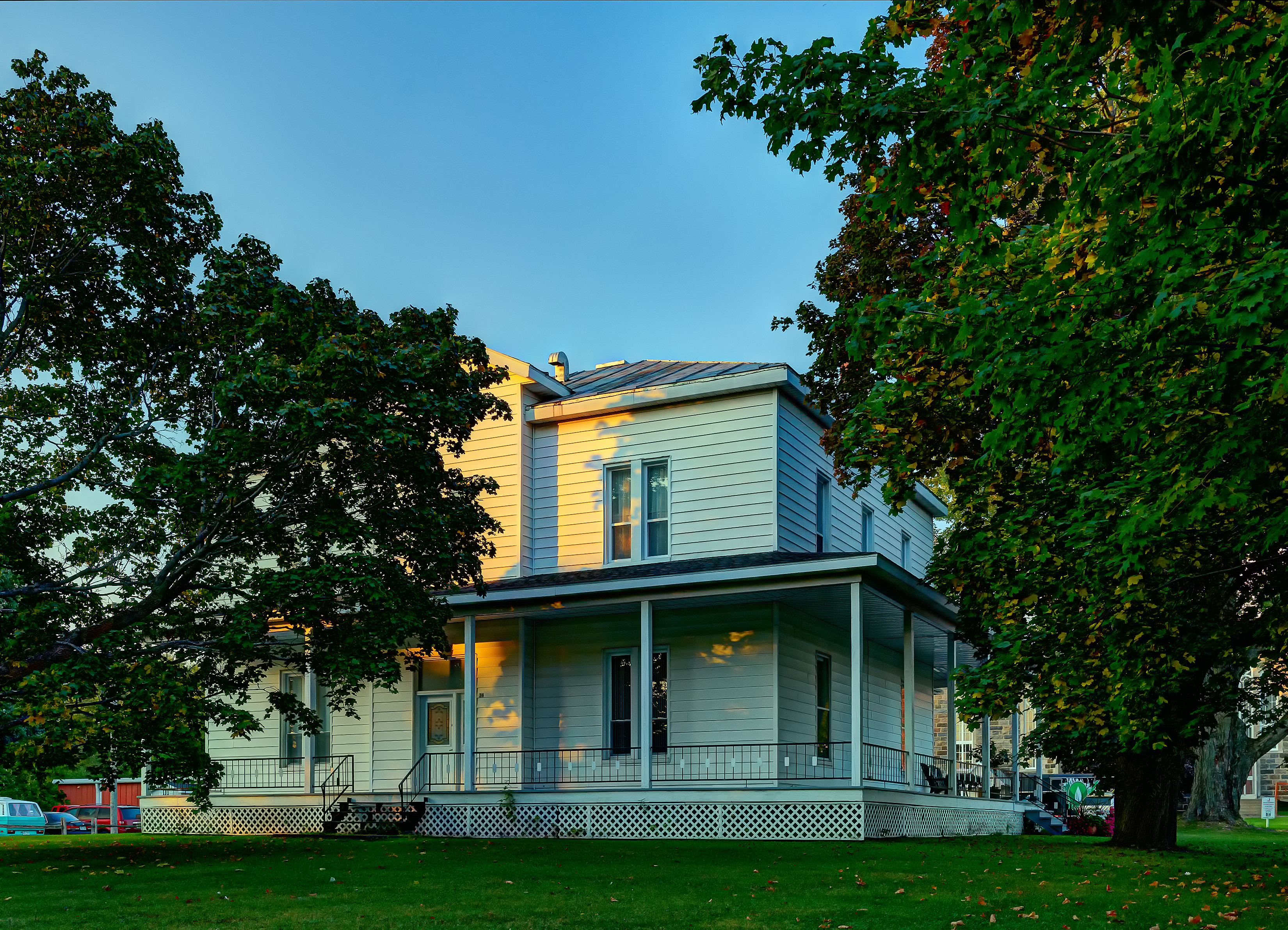 Presbytère de Saint-Cyrille, 34, rue Saint-Louis, Saint-Cyrille-de-Wendover (Canada). (Protection IP citéIP cité. Voir la liste des lieux patrimoniaux du Centre-du-Québec pour plus de détails).